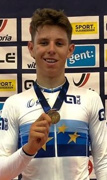 Tim Torn Teutenberg, deutscher Radsportler